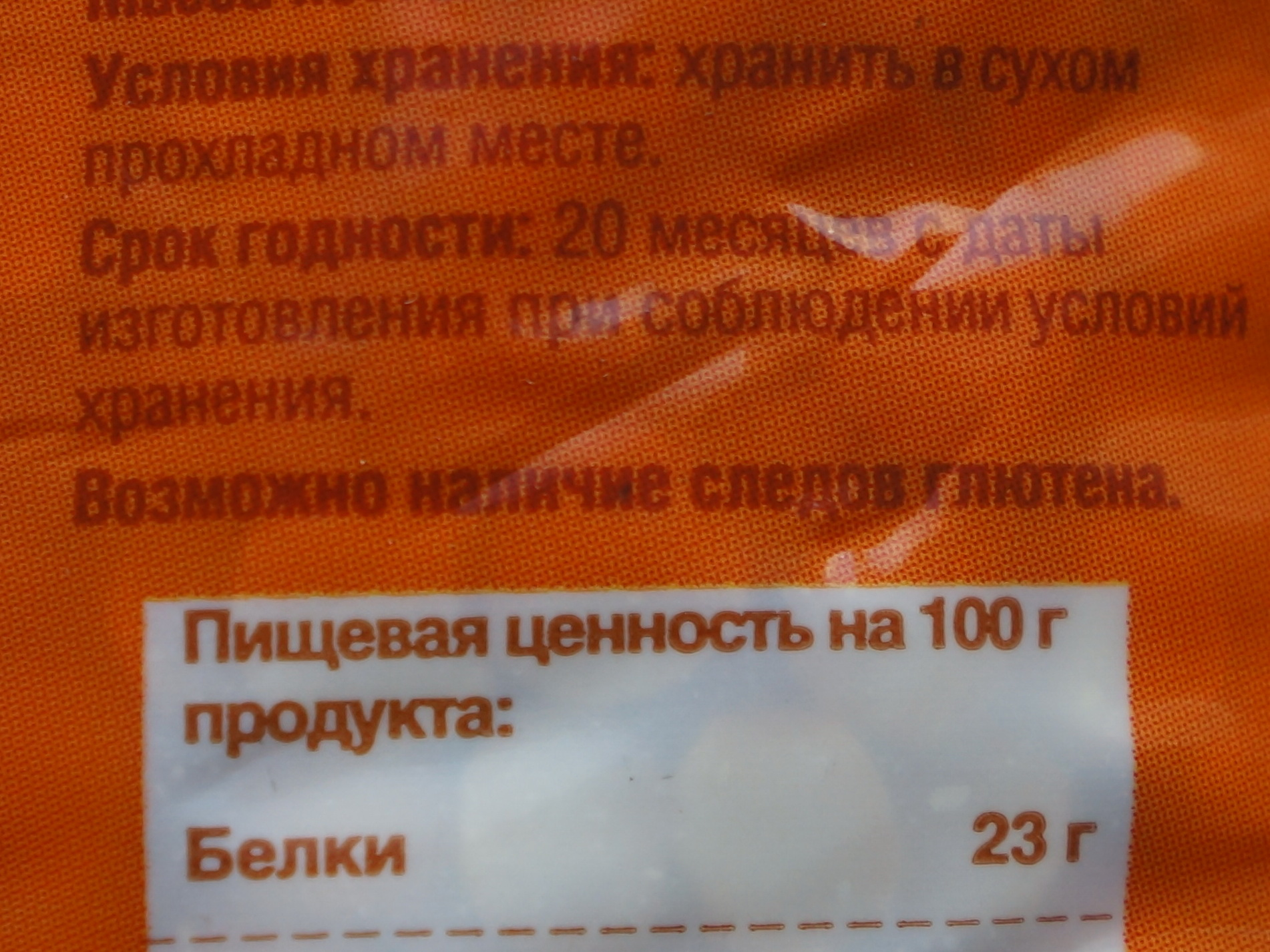 Предупреждающая о глютене надпись на пачке гороха